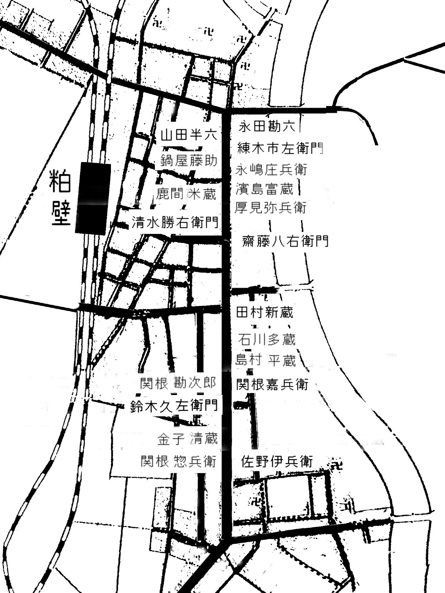 粕壁町地図